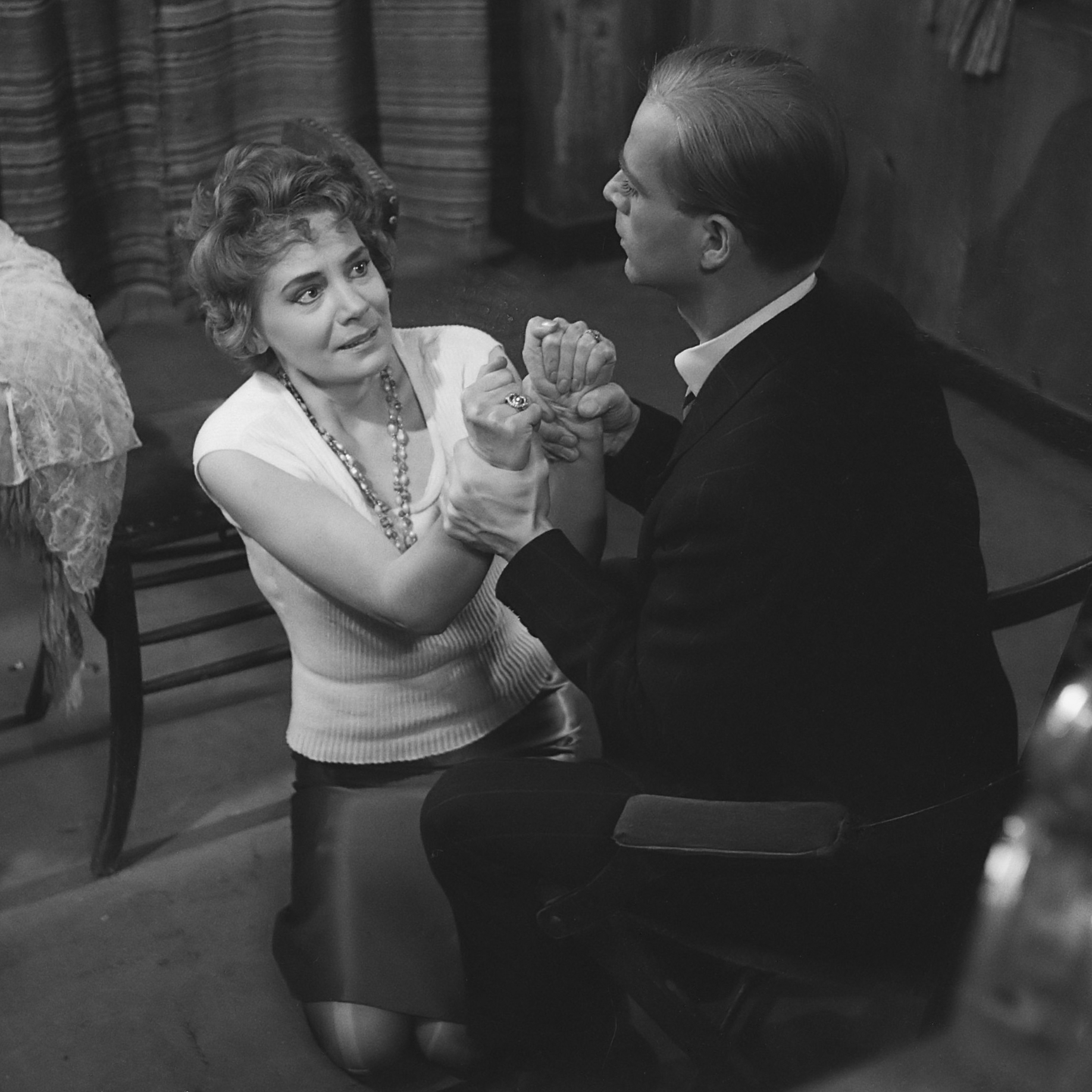 Televisiespel "Een avond uit". Fé Sciarone en Henk van Ulsen 22 december 1960